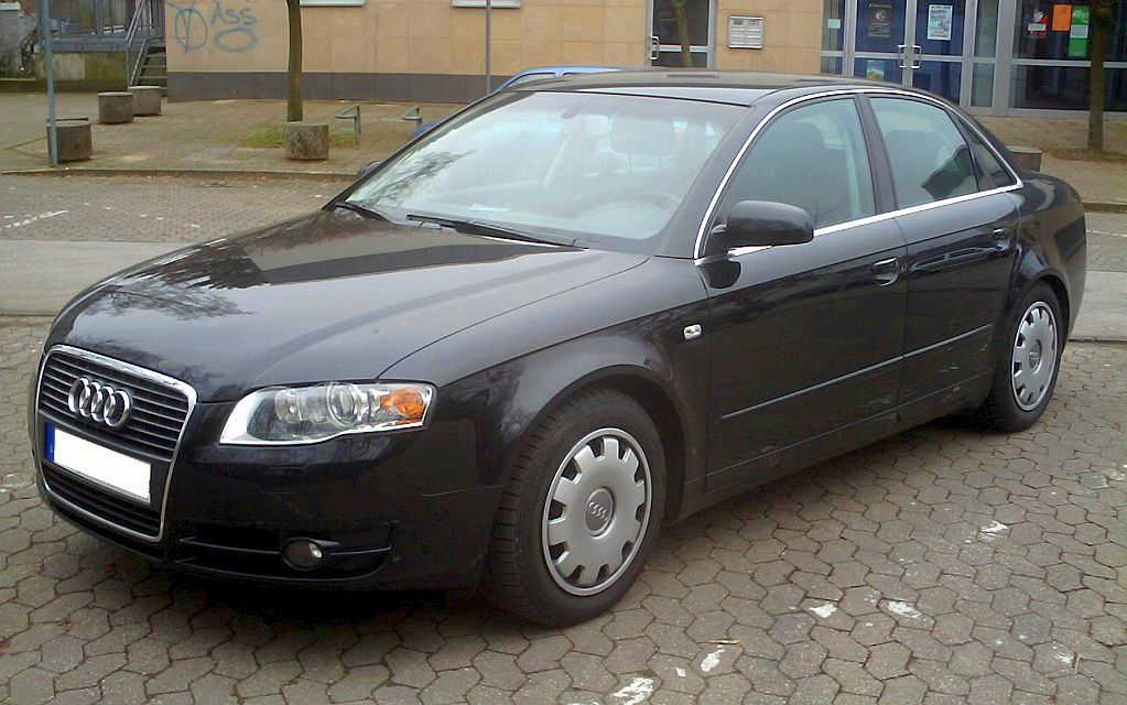 Audi A4